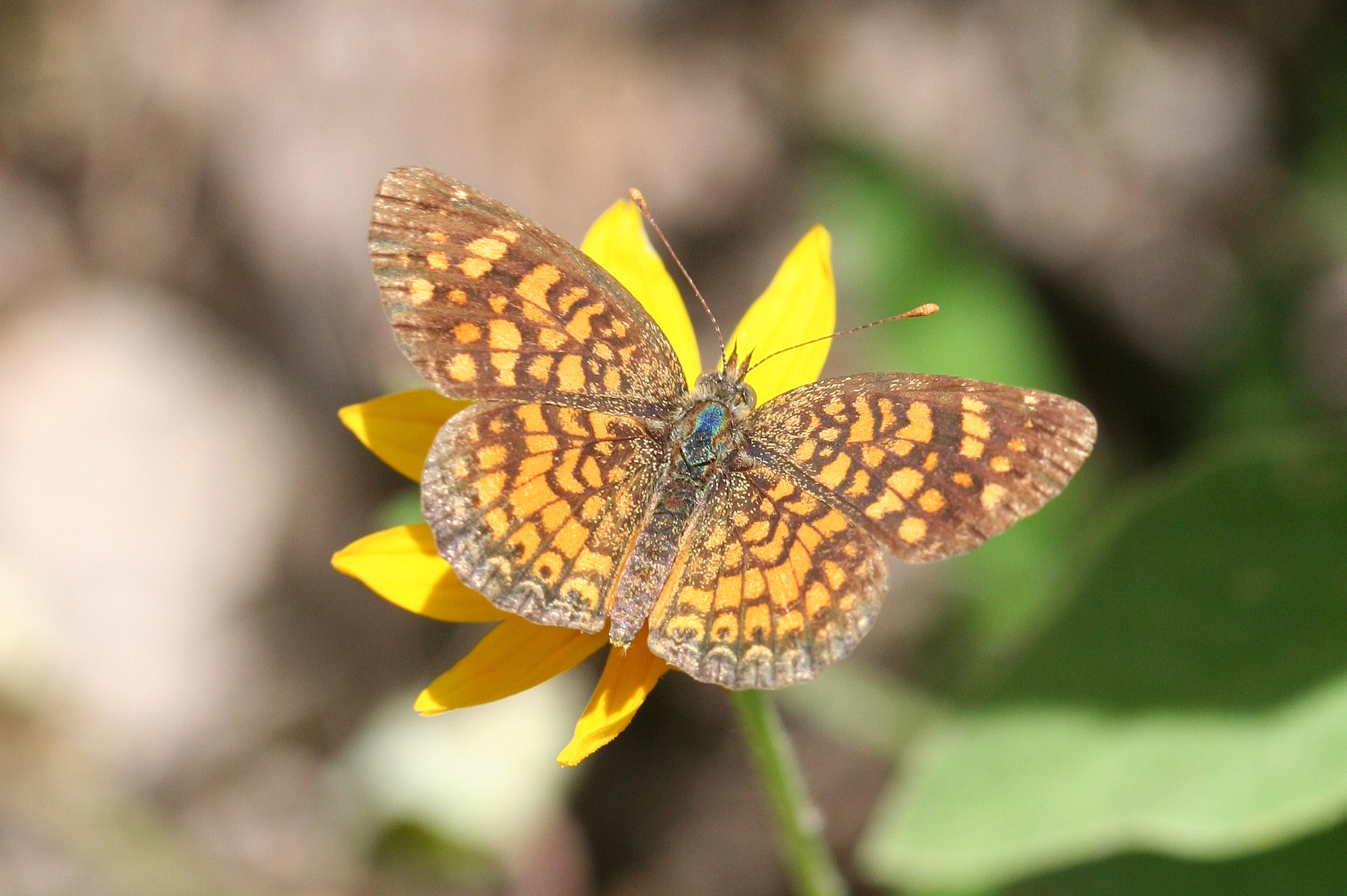 Phyciodes graphica Graphic crescent dorsal